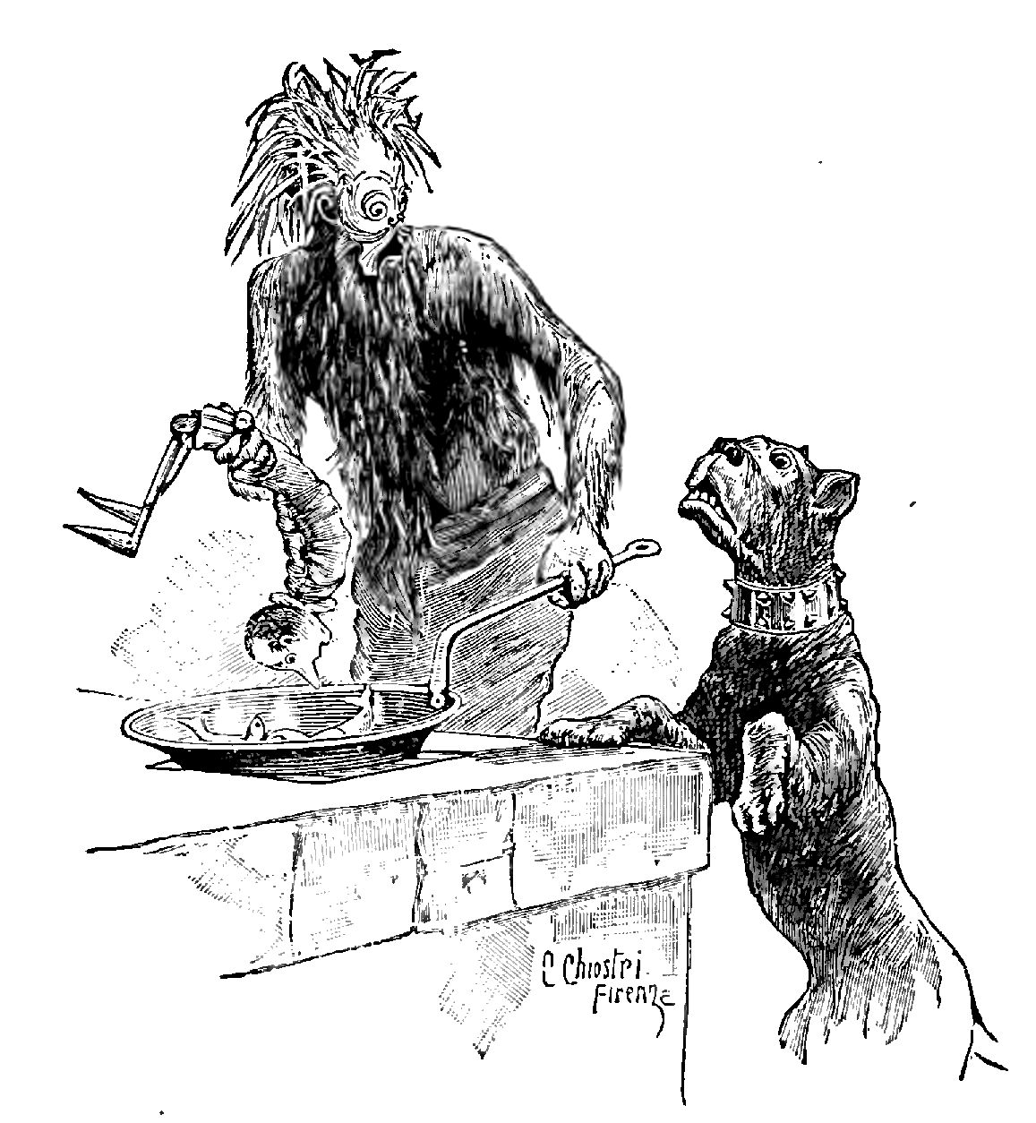 Illustrations from "Le avventure di Pinocchio, storia di un burattino", Carlo Collodi, Bemporad & figlio, Firenze 1902 (Drawings and engravings by Carlo Chiostri, and A. Bongini)